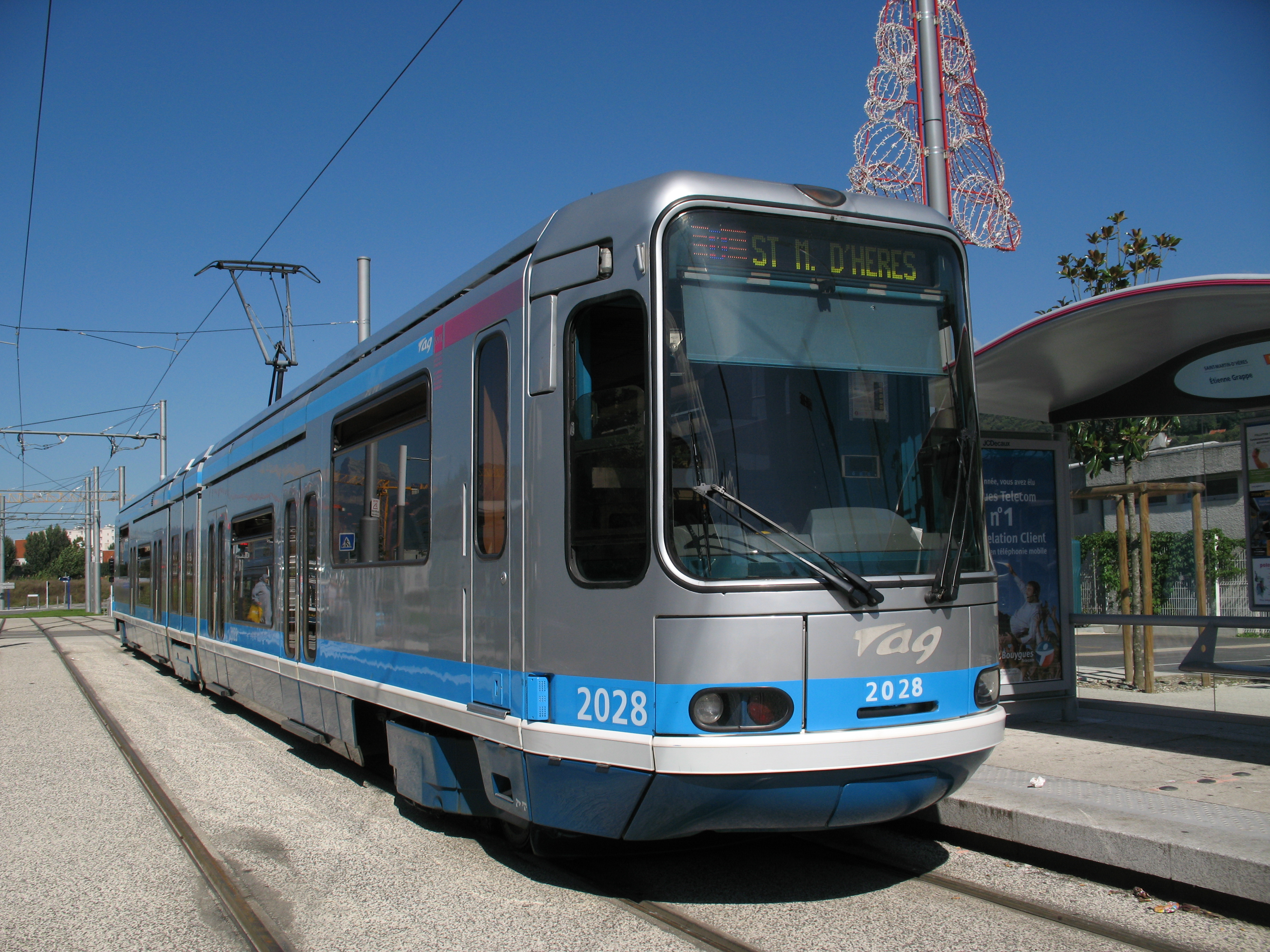 Rame Alsthom TFS sur la ligne D à la Station Etienne Grappe du réseau urbain de Grenoble.